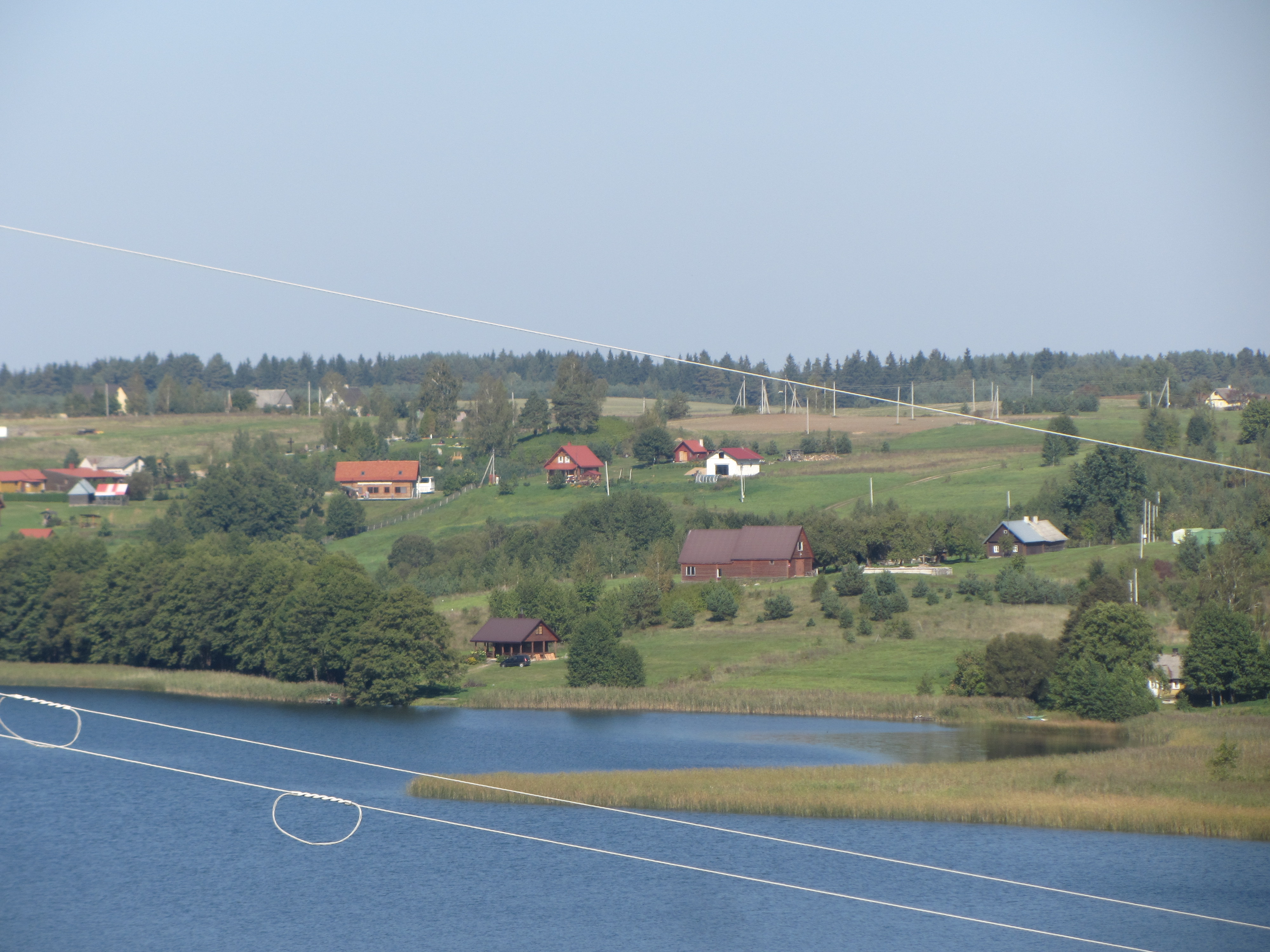 Grendavės sen., Lithuania